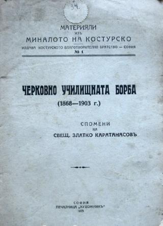 Черковно-училищната борба (1868 - 1903), Материяли из миналото на Костурско, Костурско благотворително братство, София, 1935